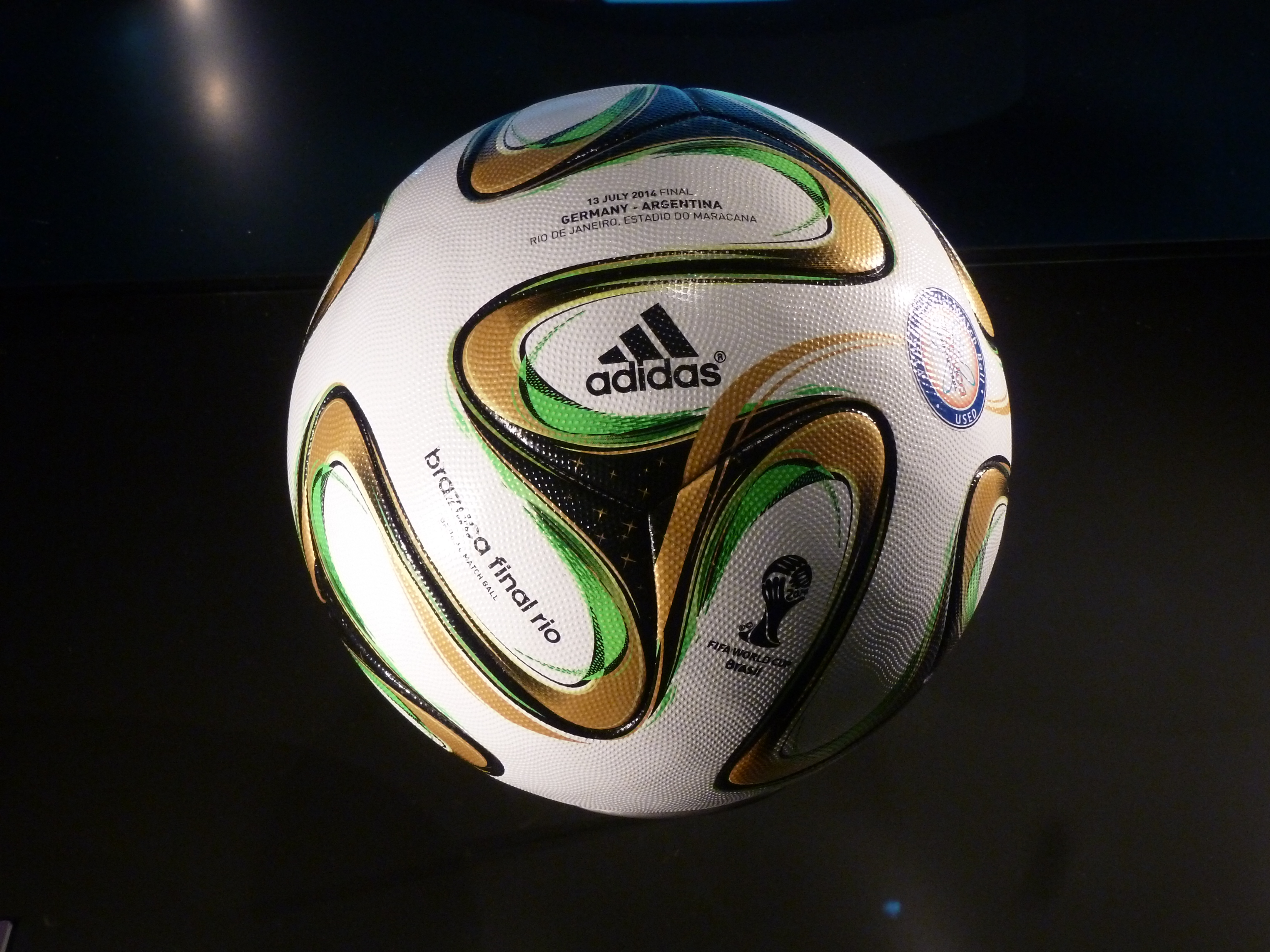 Offizieller Ball für das Endspiel der Fußball-Weltmeisterschaft 2014 Deutschland:Argentinien